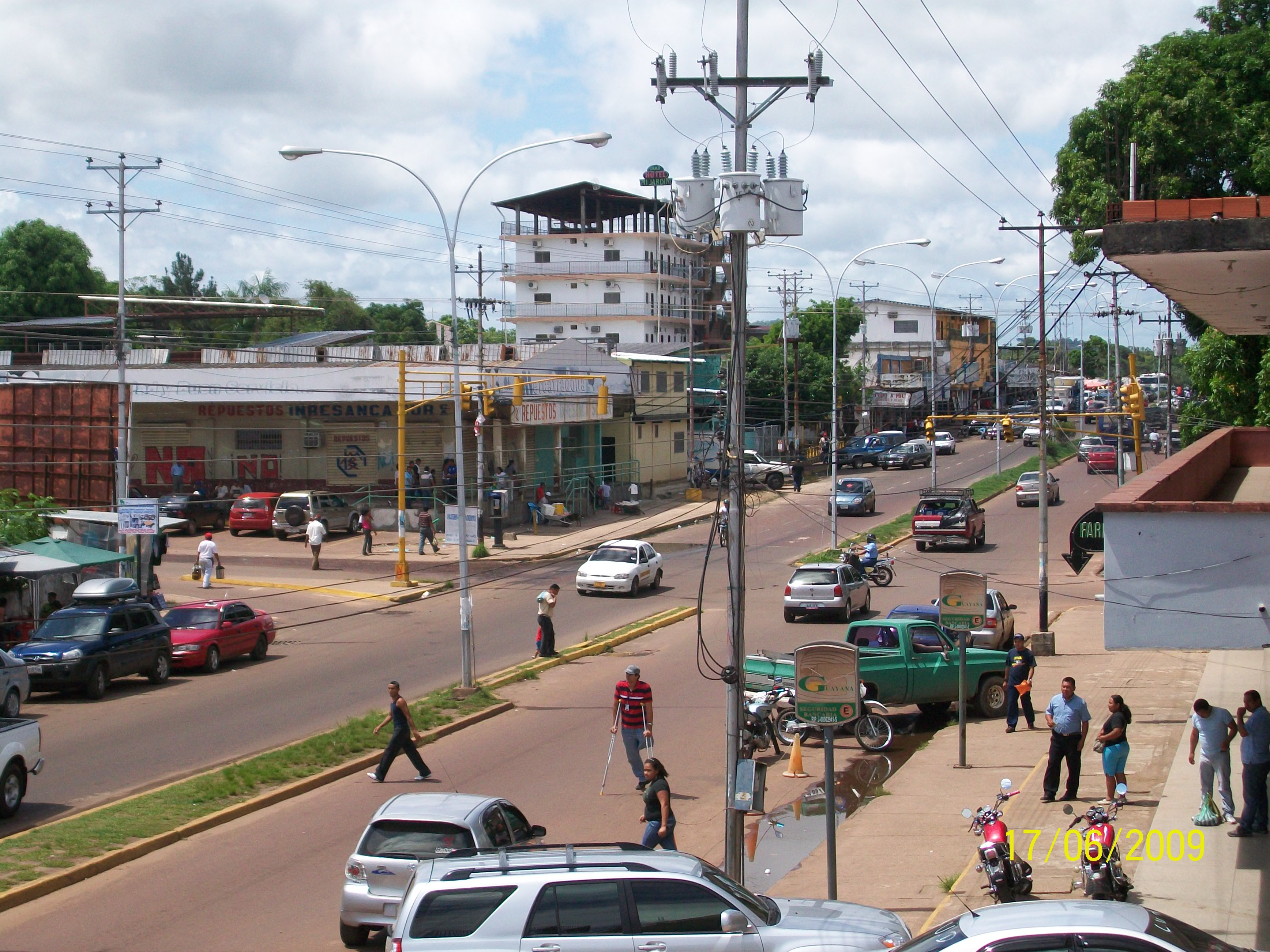 es un parte del centro de puerto ayacucho,cerca del mercado indigena de puerto ayacucho,al fondo se ve el otel mi jardin, que esta ubicado en la avenida orinoco